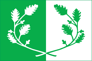 Vlag van de stad Eeklo